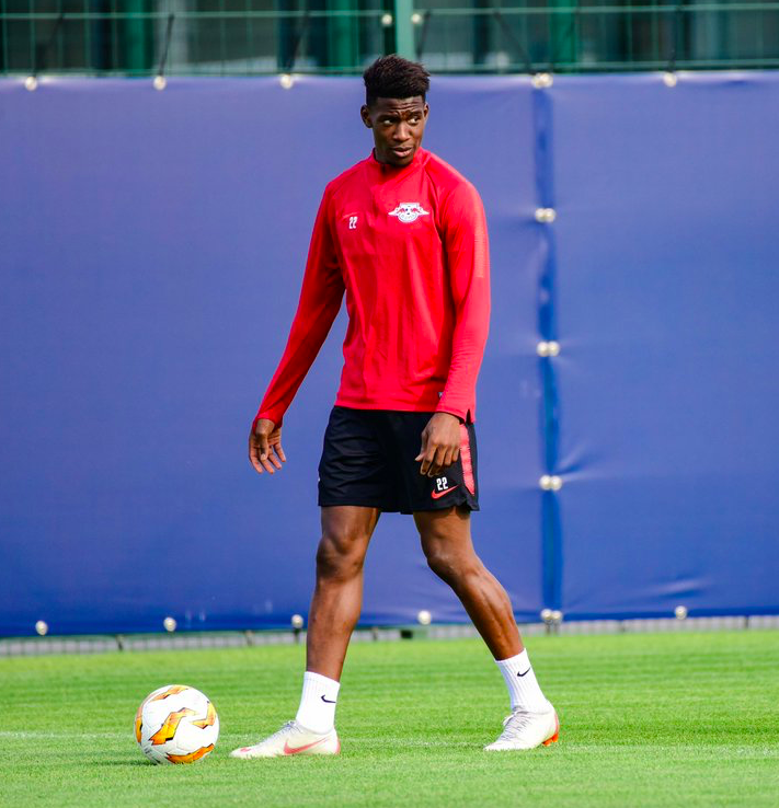 Nordi Mukiele RB Leipzig Training 2018